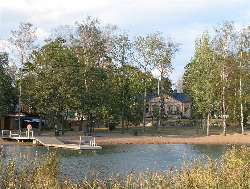 Mustasaari, Helsinki. Huom: Muista säilyttää viittaus kuvaajaan, mikäli käytät kuvaa.